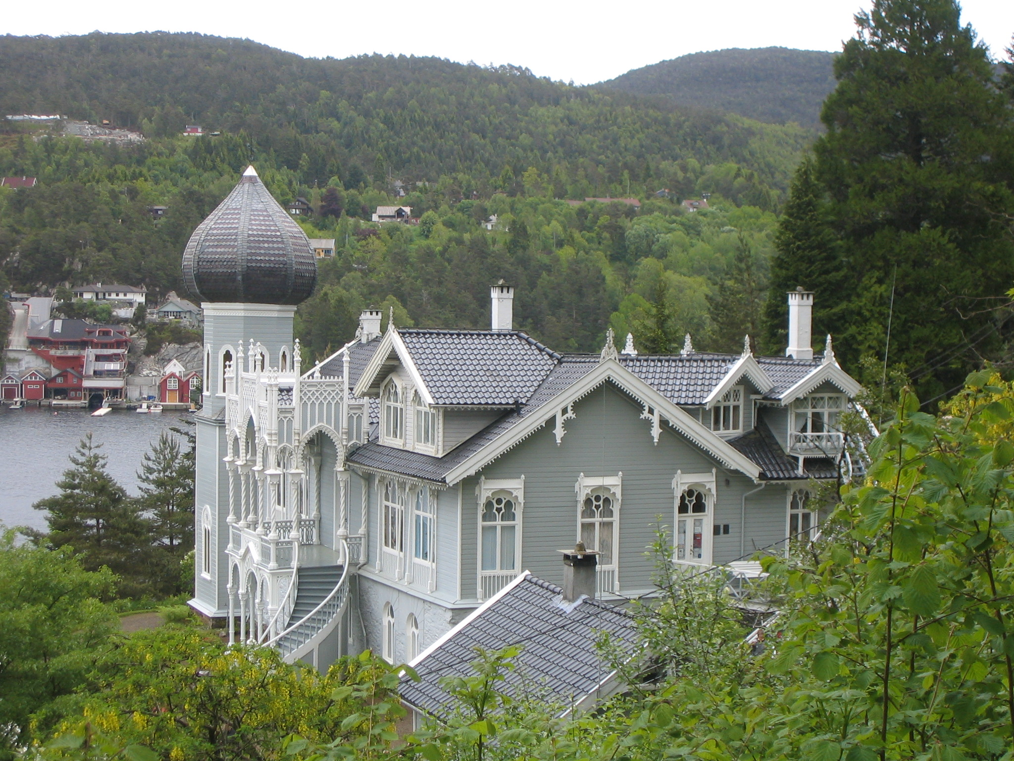 Lysoeen